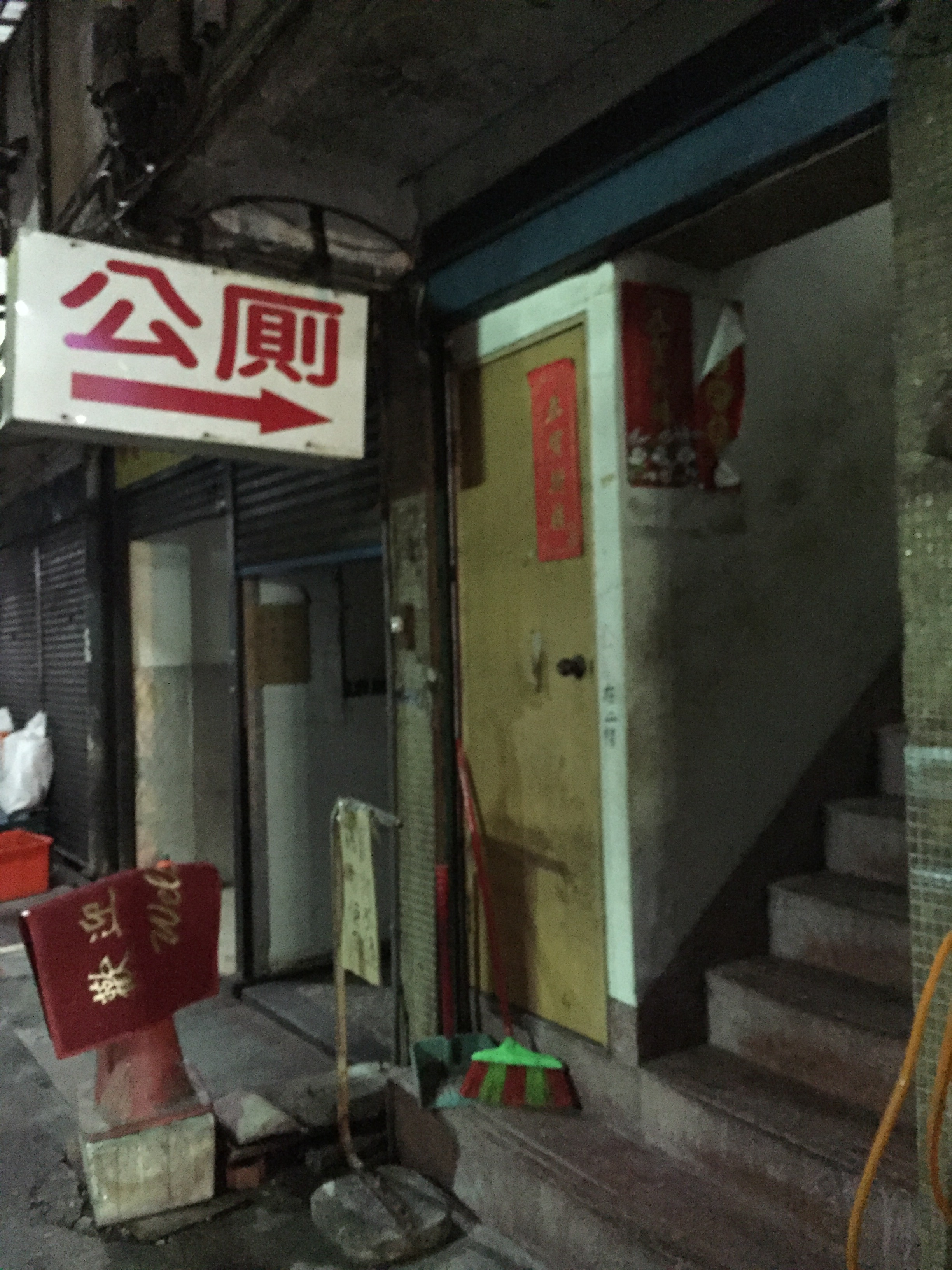 台灣台北市士林區華榮街市場公廁